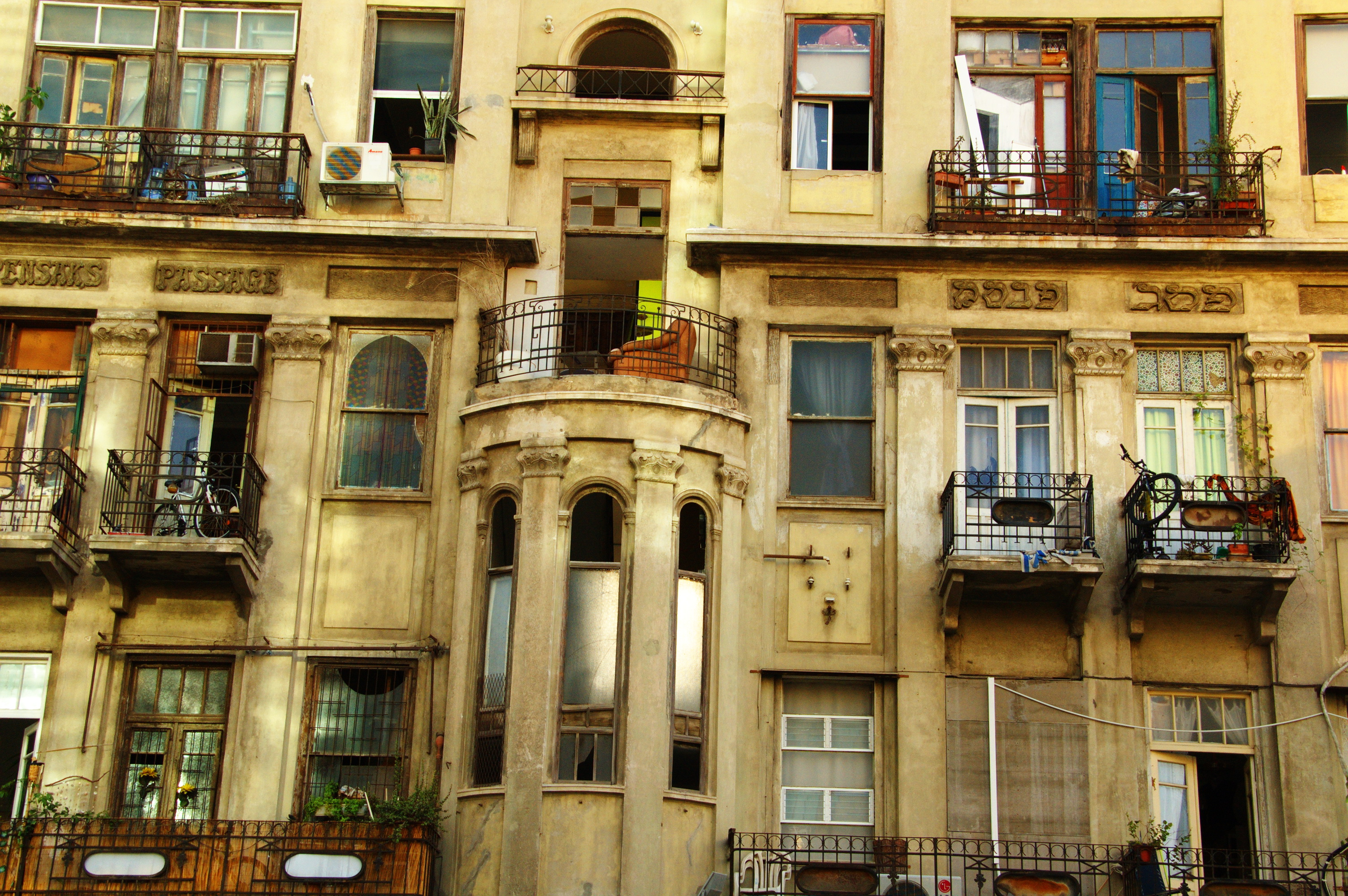 פסג' פנסק ברחוב הרצל 16 בתל אביב